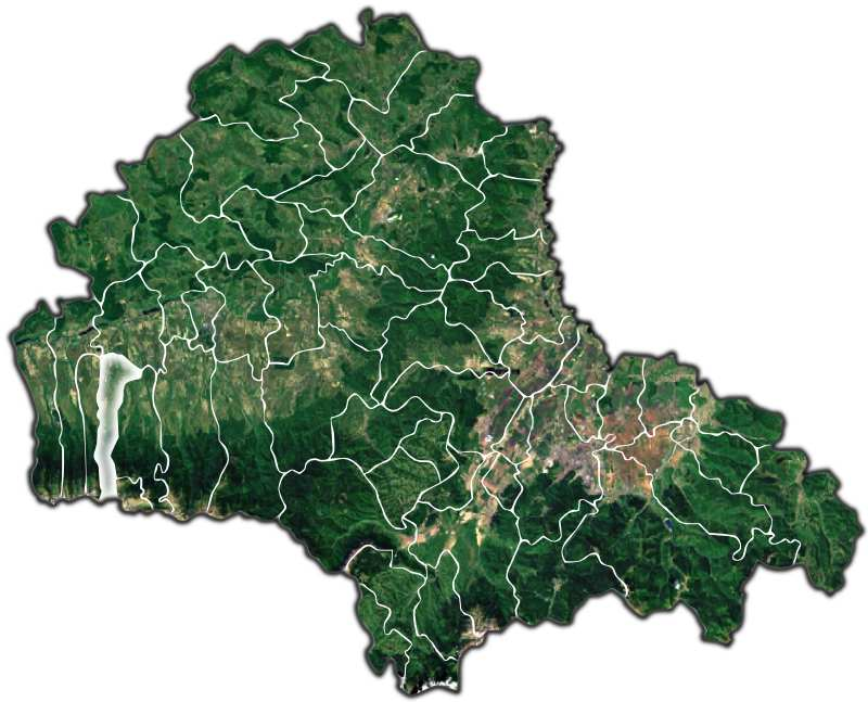 Sambata de Sus jud Brasov